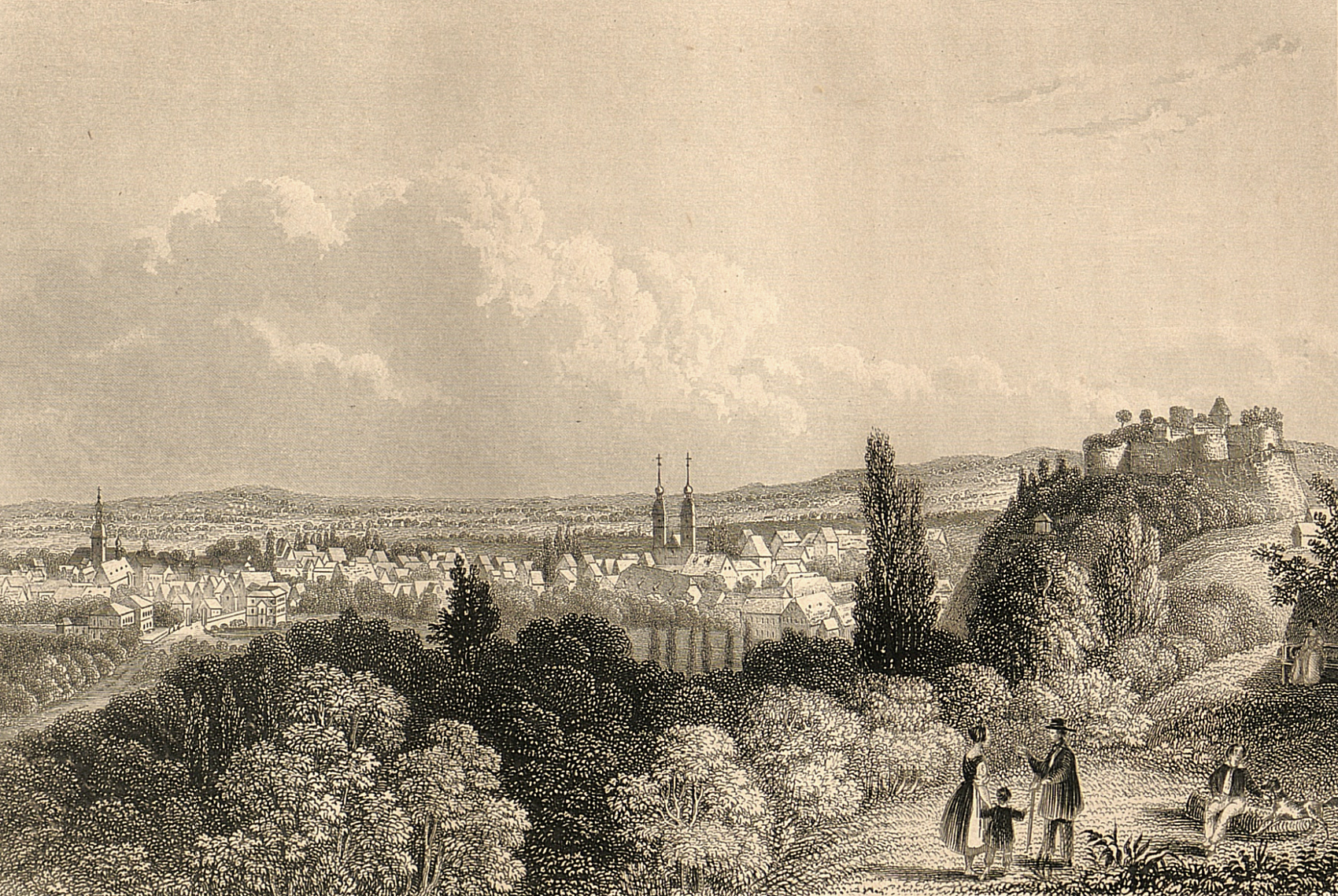 Ansicht von Bielefeld um 1840